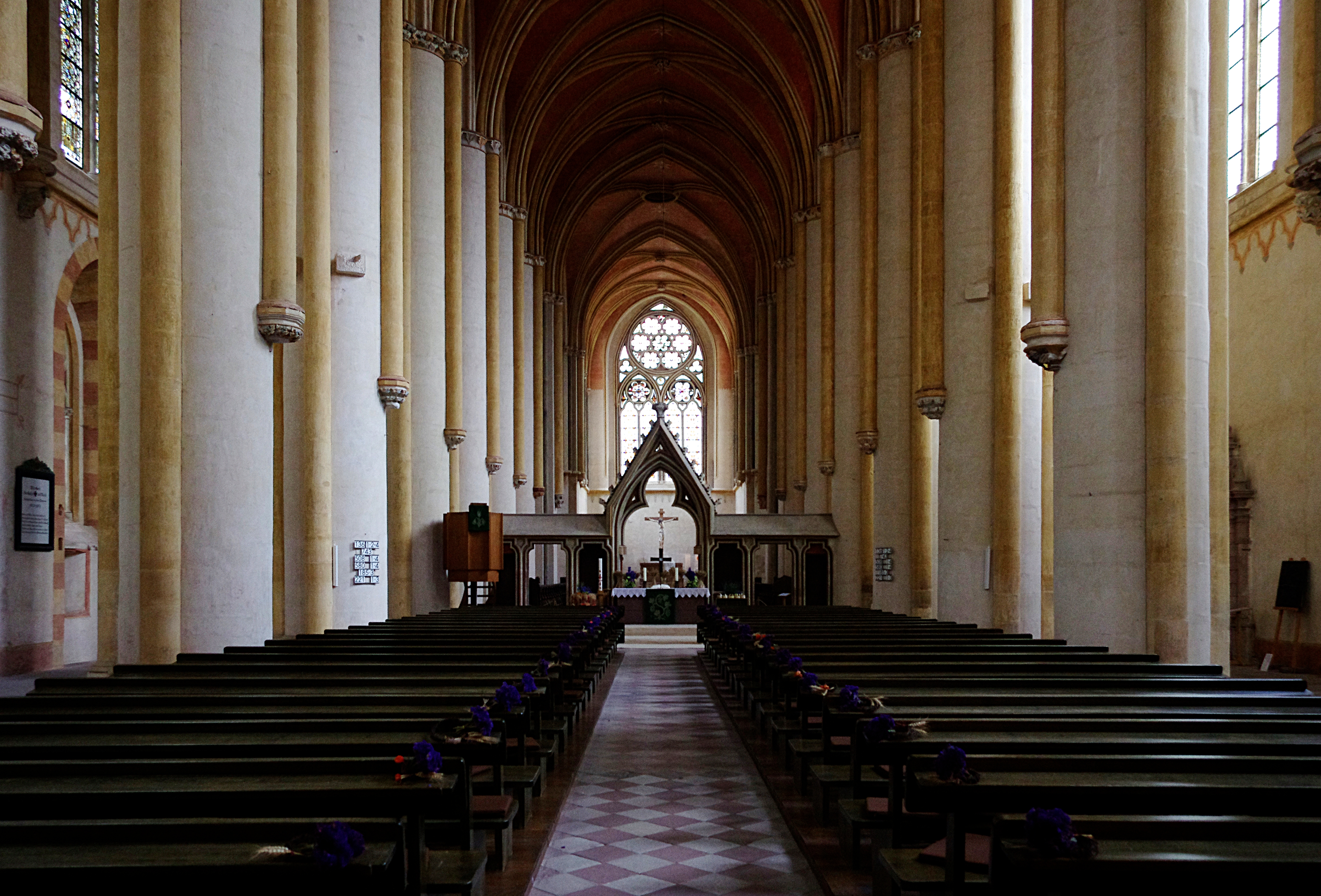 Haina (Kloster) in Hessen. Das Kloster Haina wurde im 12. Jahrhundert erbaut.